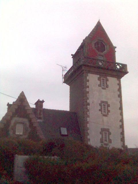 Phare de la Haize, près de Saint-Malo